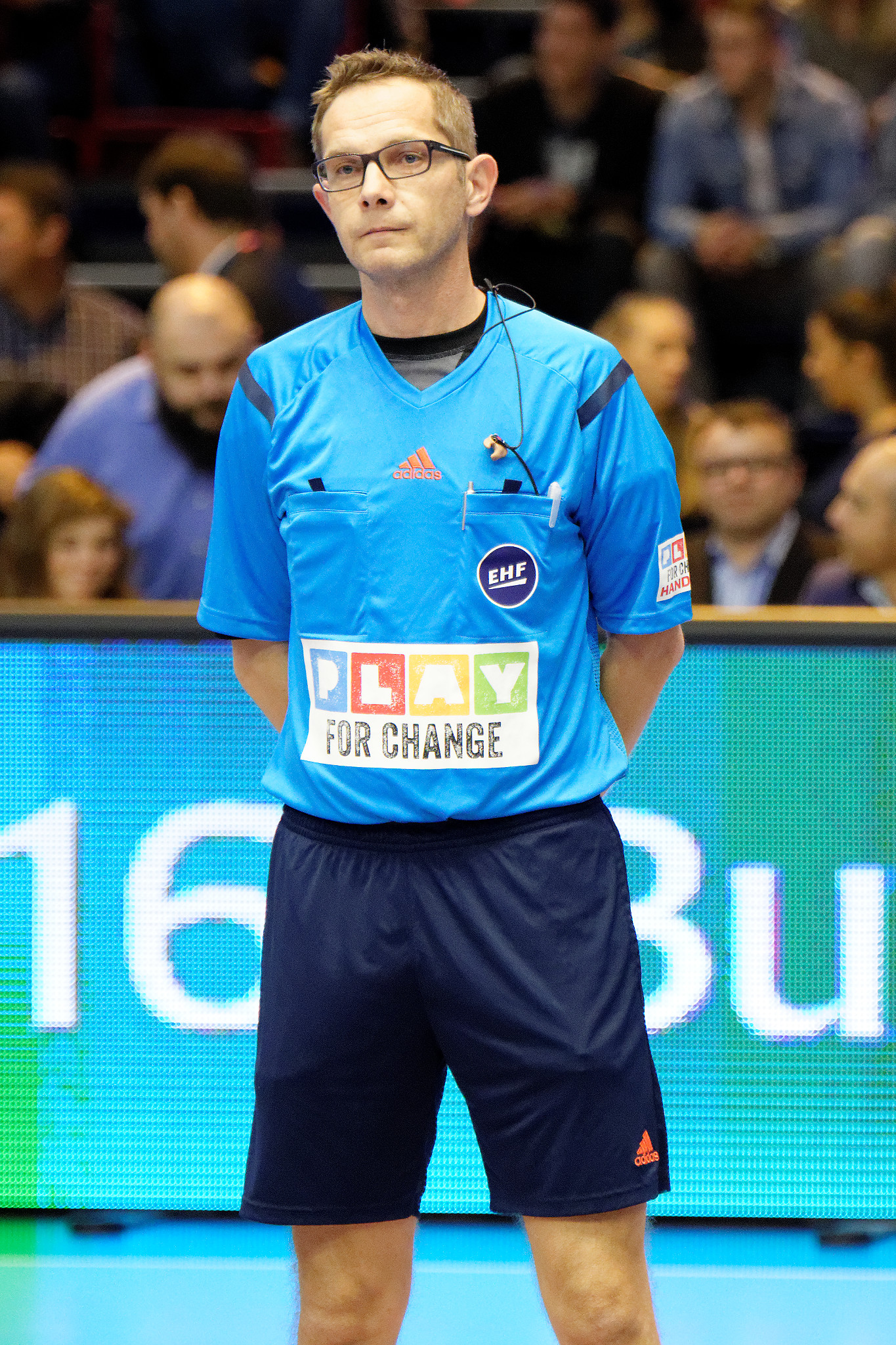 Rencontre de phase de groupe de la ligue des champions 2015-16 entre le PSG et le RK Zagreb. A la Halle Carpentier (Paris), le 11 ocotbre 2015.